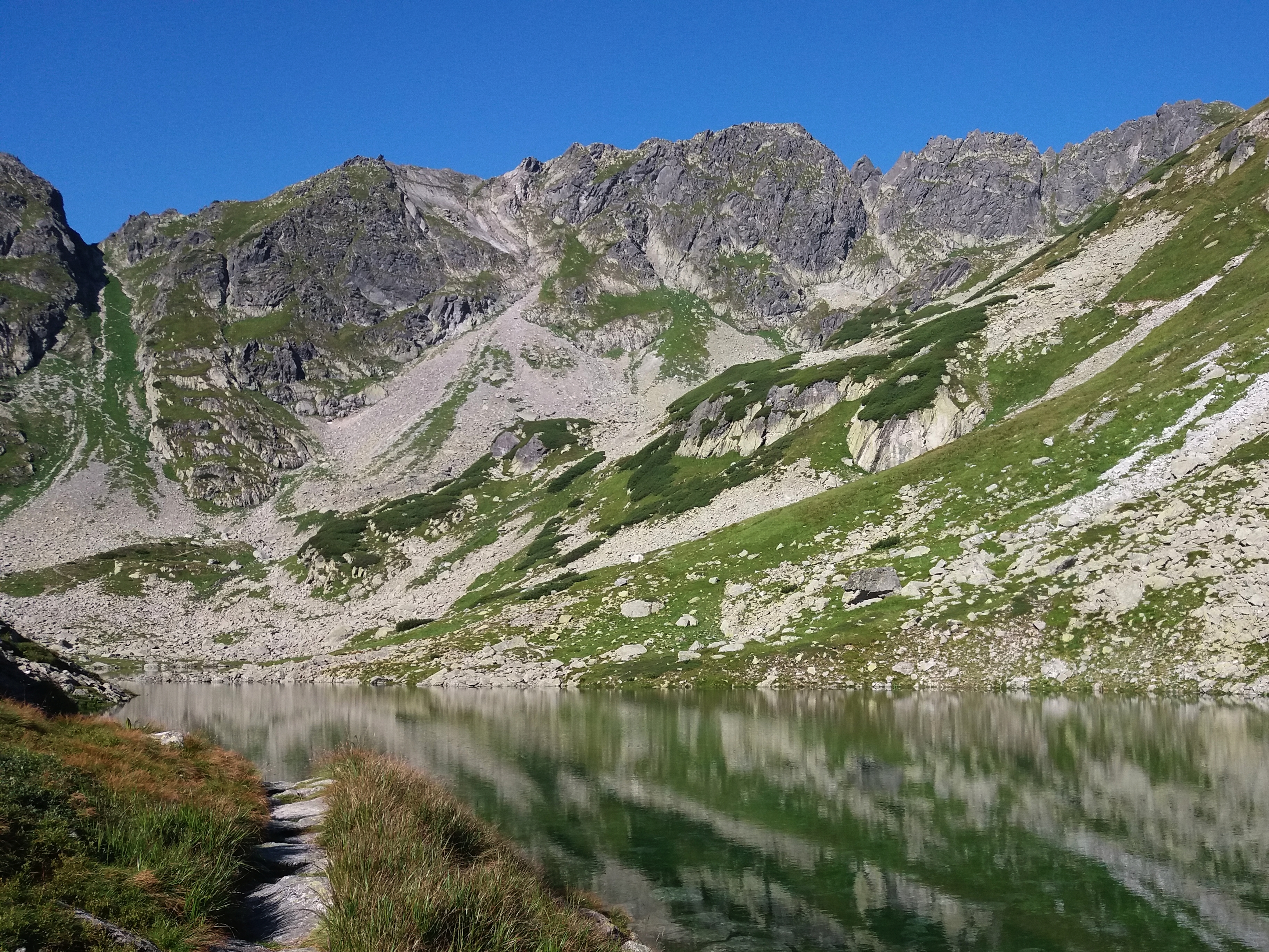 Dolinka za Nbichem i Szpiglasowa Grań